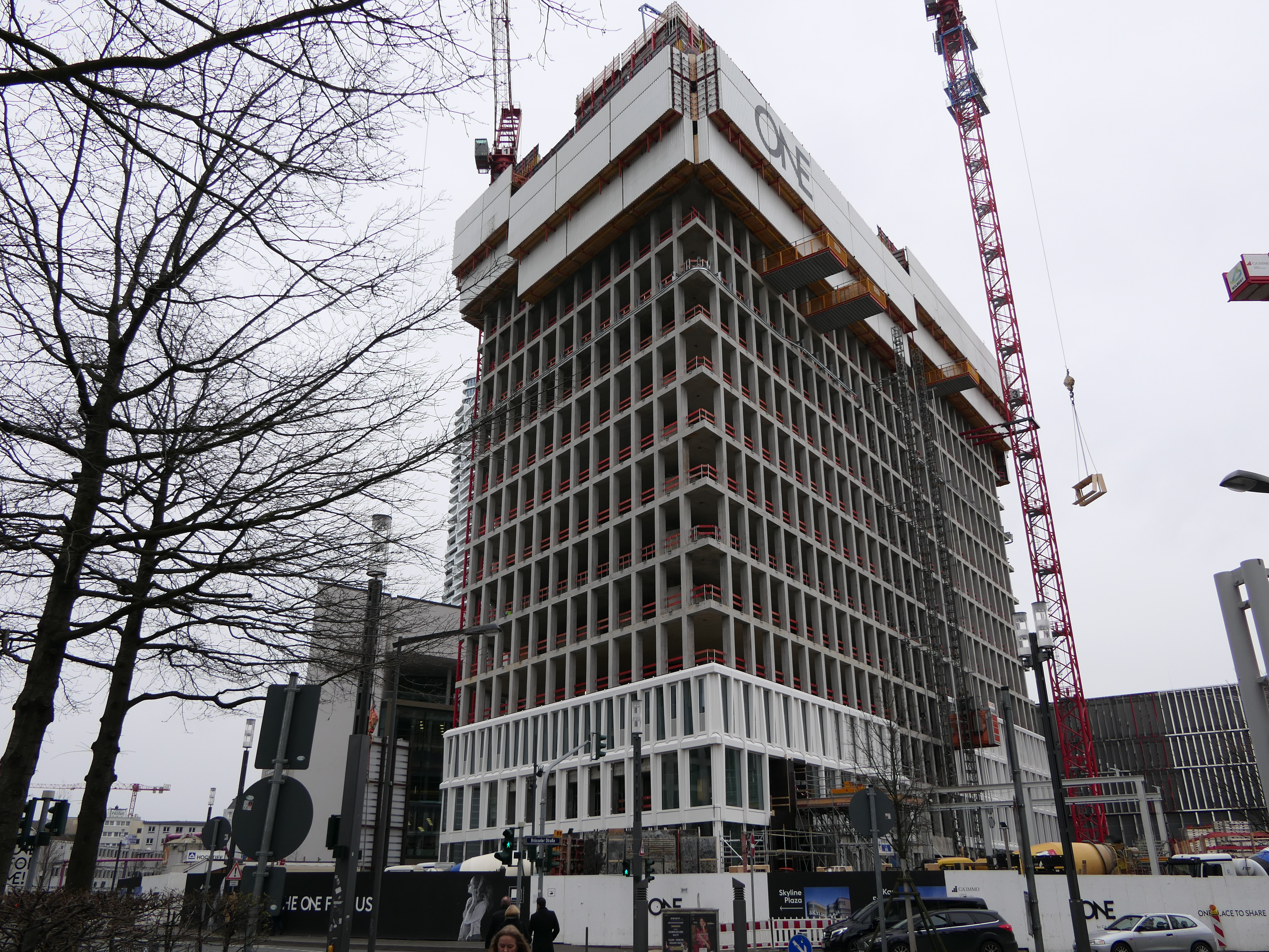 Baufortschritt am Hochhaus "One" in Frankfurt im März 2020.